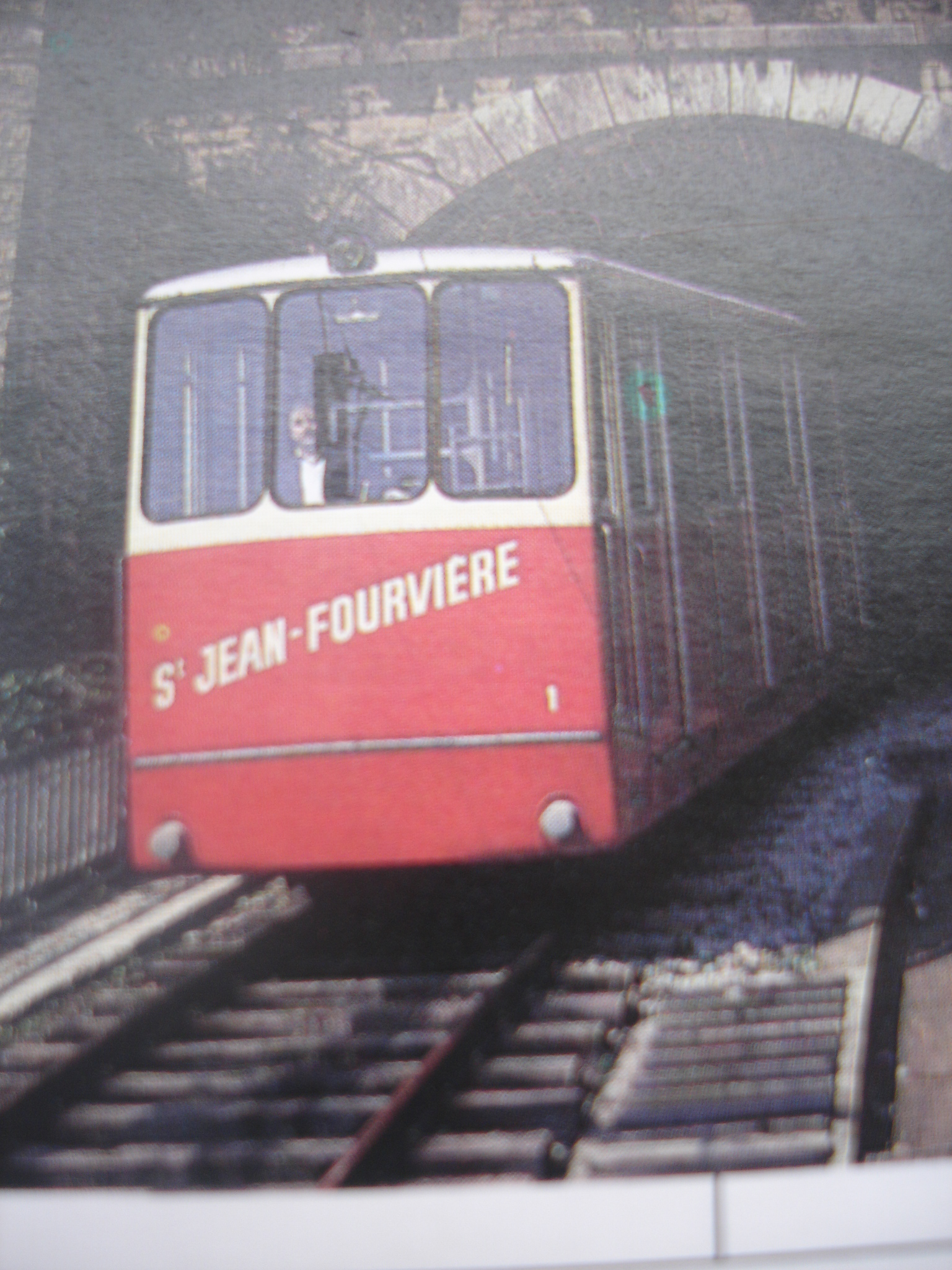 Lyon : funiculaire, dit "la ficelle", entre Saint-Jean et Fourvière